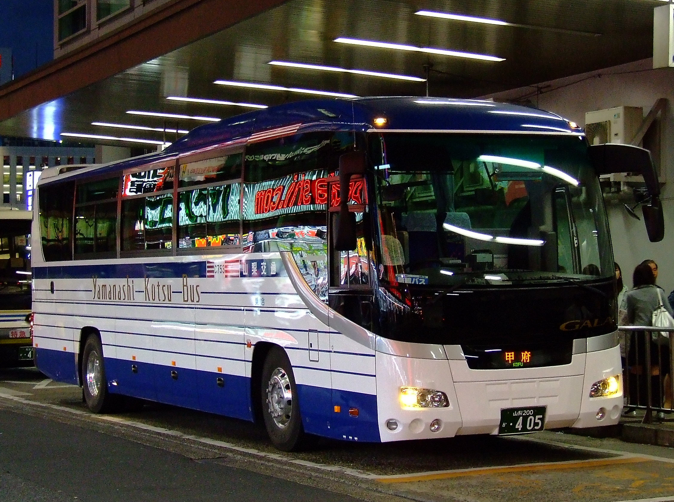 山梨交通の高速バス 中央高速バス甲府線 ニューガーラC753